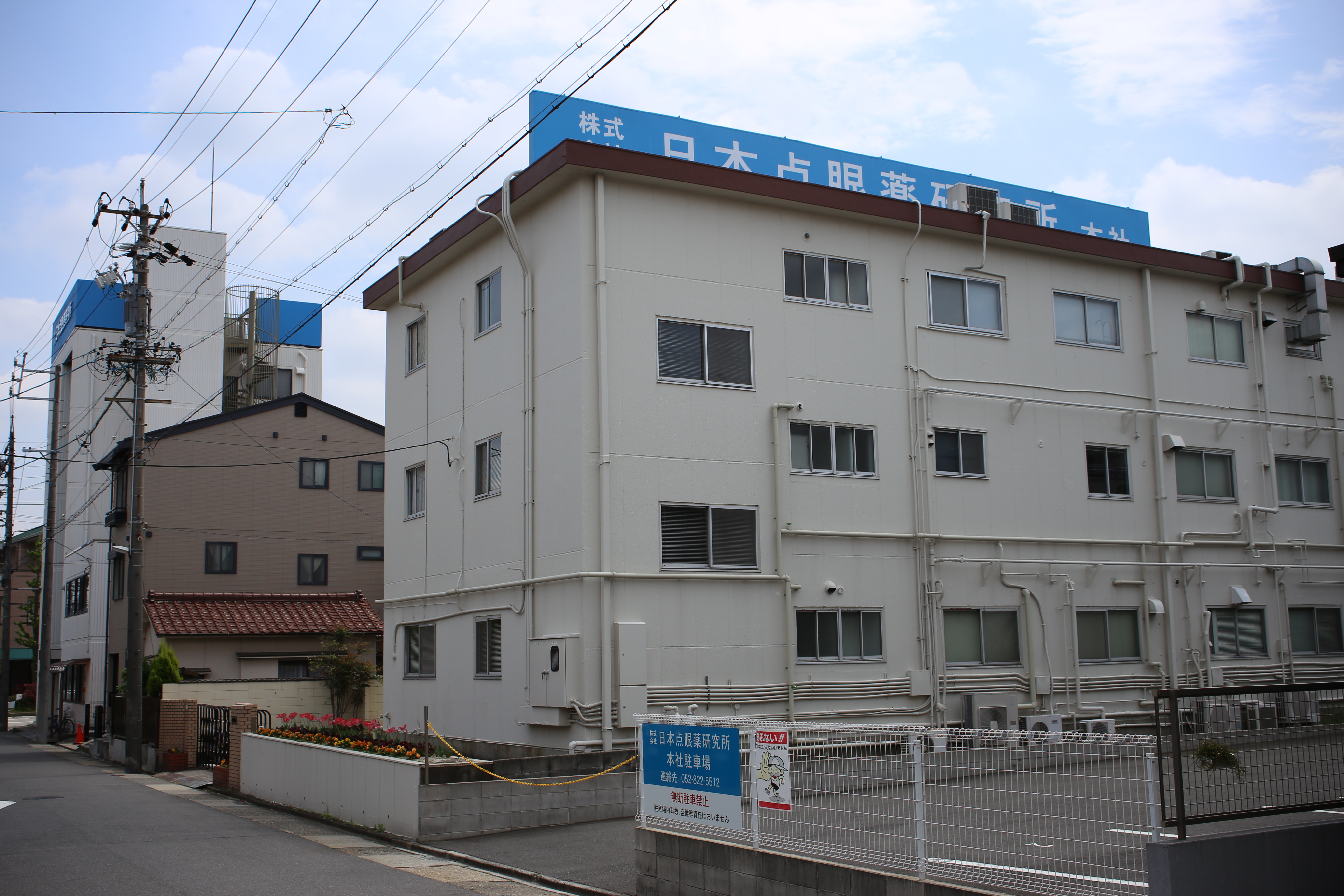 愛知県名古屋市南区西桜町の日本点眼薬研究所本社を北側公道西側より撮影